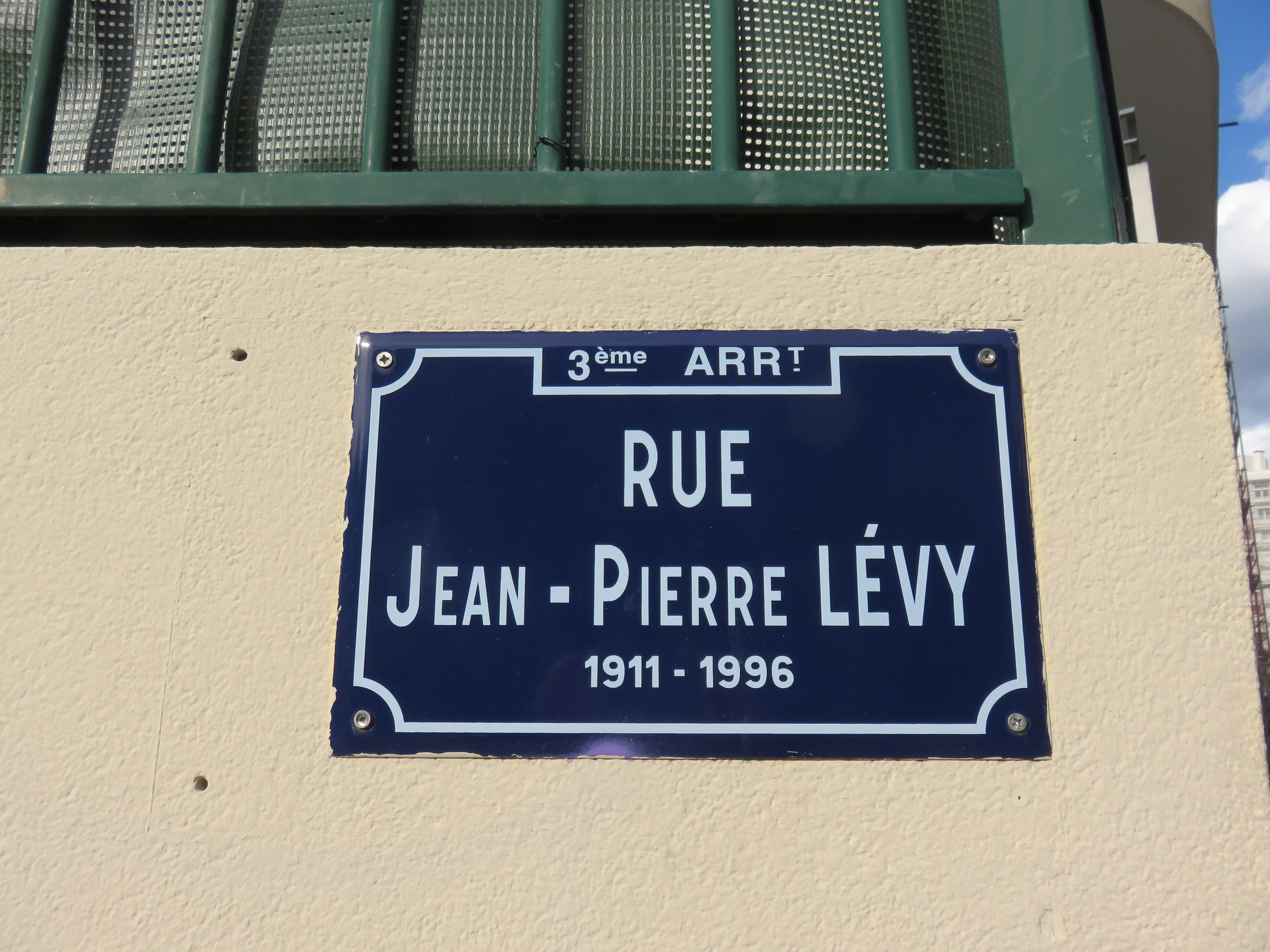 Plaque de la rue Jean-Pierre Lévy, dans le 3e arrondissement de Lyon.